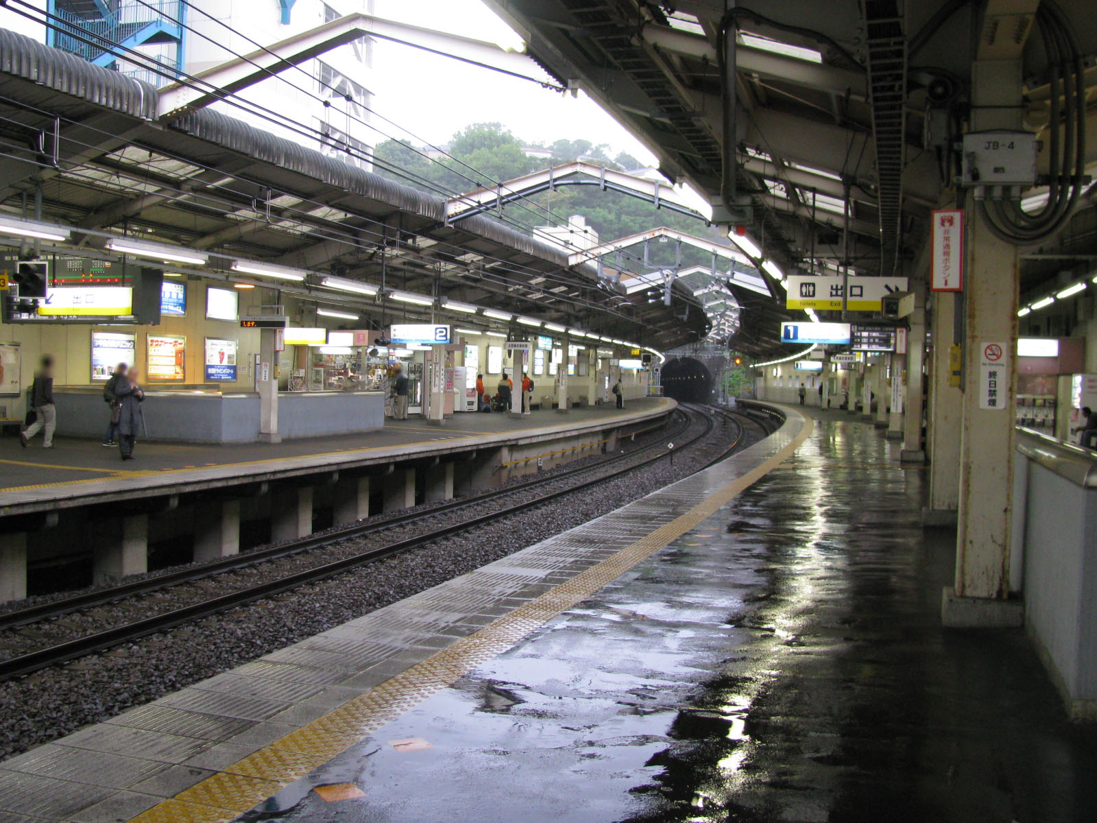 京浜急行横須賀中央駅ホーム